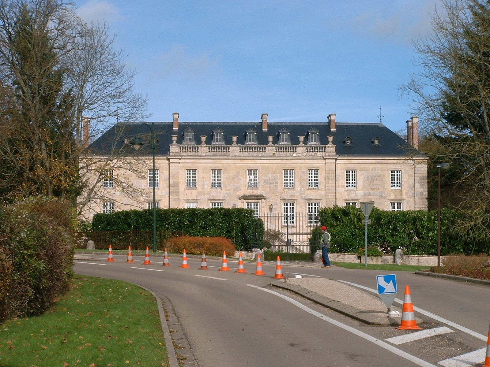 Château de Sauvigny-le-Bois, Yonne